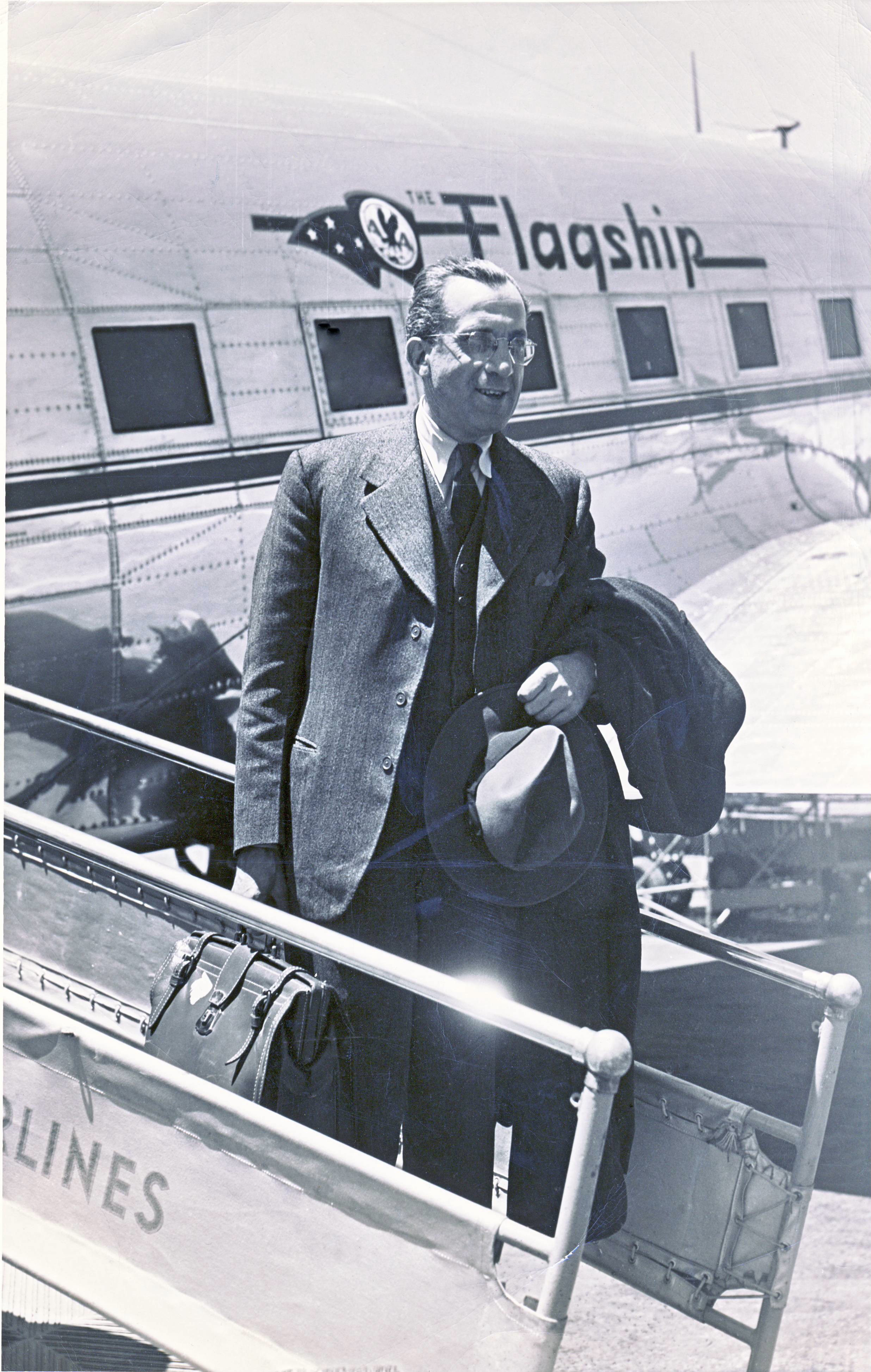 Jef Rens arrive à Mexico (1946)